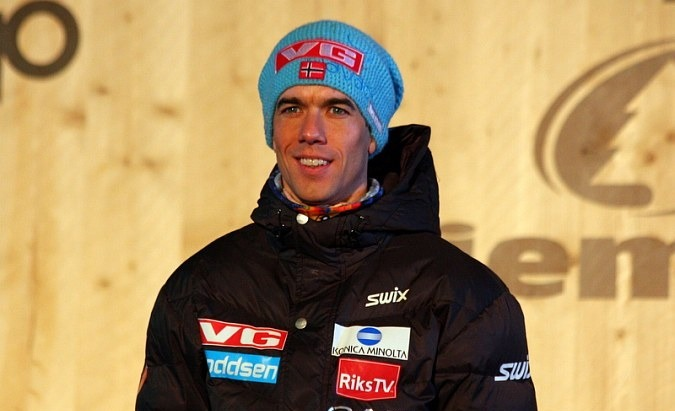 Anders Bardal podczas dekoracji medalistów konkursu indywidualnego mężczyzn na skoczni normalnej (Mistrzostwa Świata 2013, Val di Fiemme).